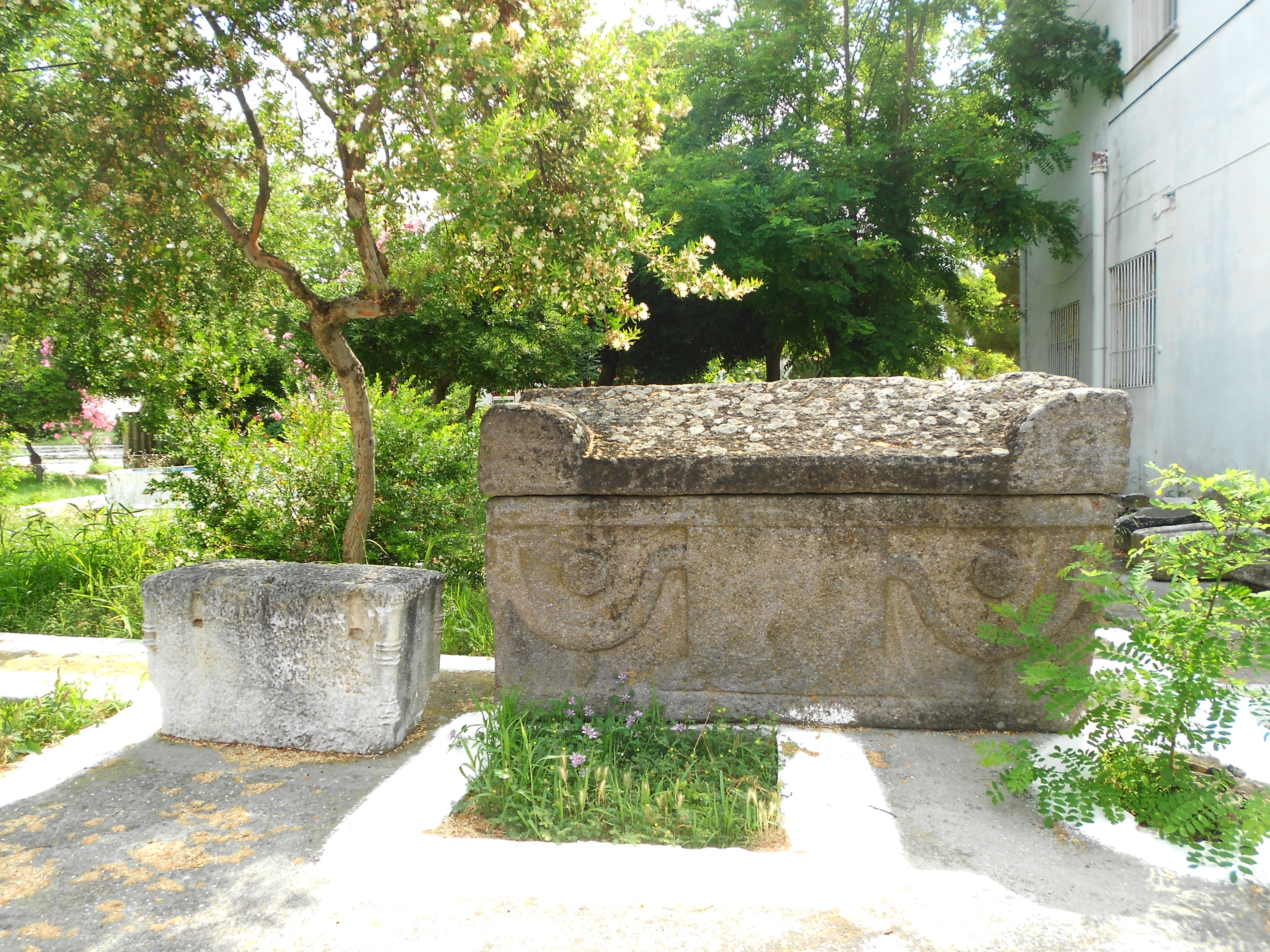 Οι επιστήμονες αποδίδουν τη μαρμάρινη σαρκοφάγο στον επίσκοπο Ωρεού Ιωάννη